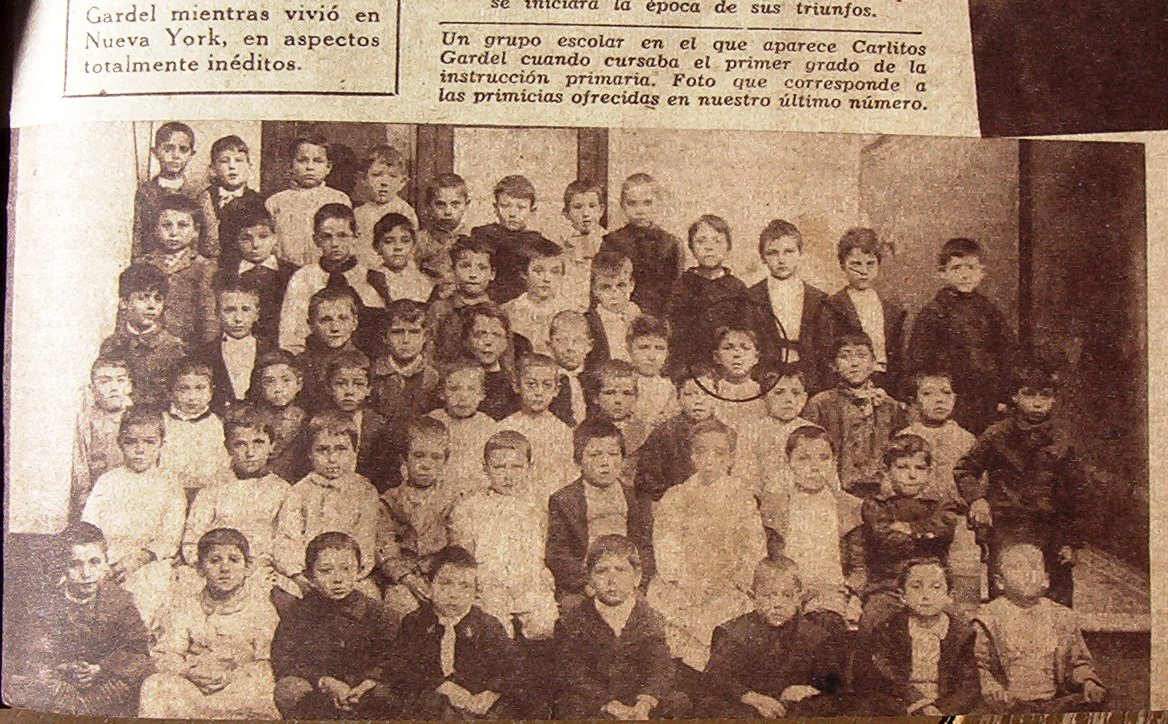 Carlos Gardel niño, Montevideo. Con sus compañeros de primer Grado "C". Escuela de Segundo Grado de Varones No 27, Calle Durazno 337(numeración antigua), Montevideo, Barrio Palermo. En el mismo predio donde funcionaba la escuelita de Carlos Gardel, demolida en 1947, funciona actualmente el Colegio Zhitlovsky, calle Durazno 1476 (numeración actual), Montevideo, Uruguay.